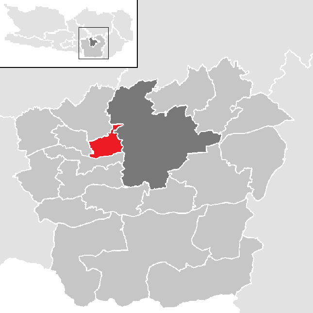 Bezirk Klagenfurt-Land